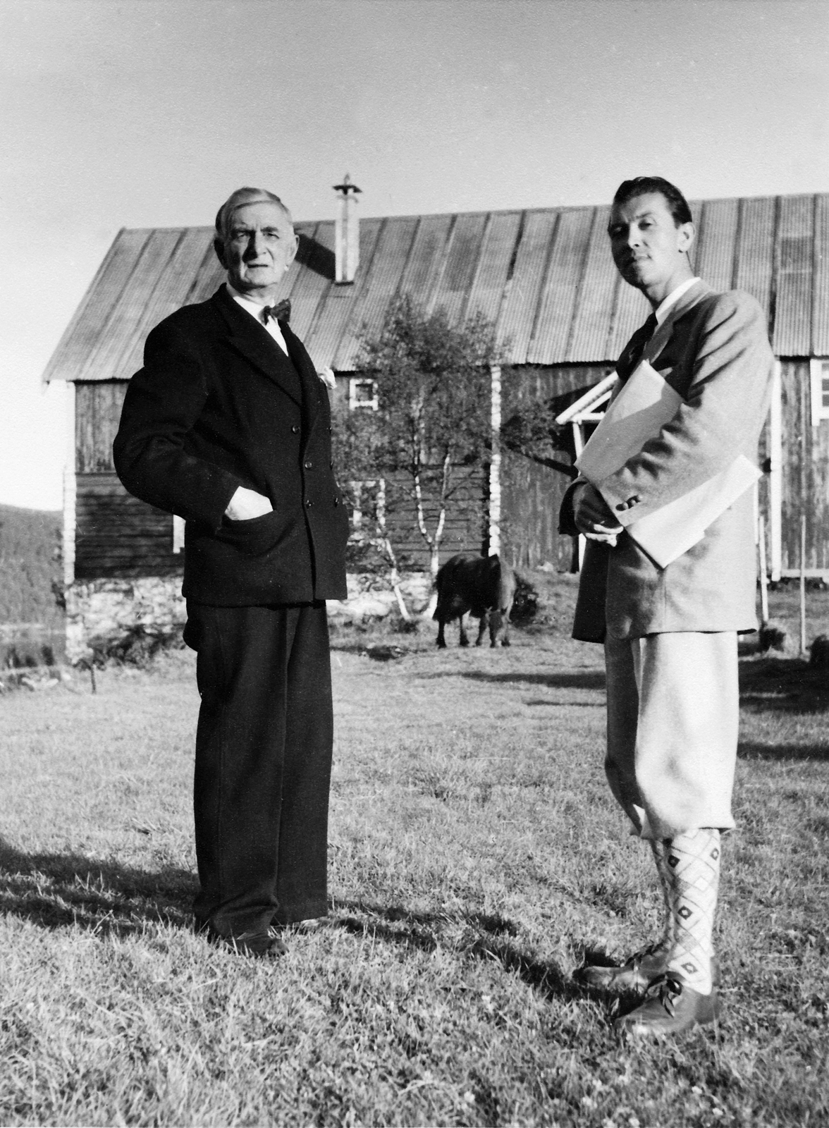 Etter at Gunnar Bratlie hadde besøkt forfatteren Johan Falkberget på Ratvolden 26. august 1952, skrev Falkberget blant annet "Velkommen tilbake til fjellet!" som en hilsen til Bratlie i boken "Nattens brød - Johannes". Gunnar Bratlie bodde senere på Røros fra 1972 til 1982. Foto: Knut Aune.